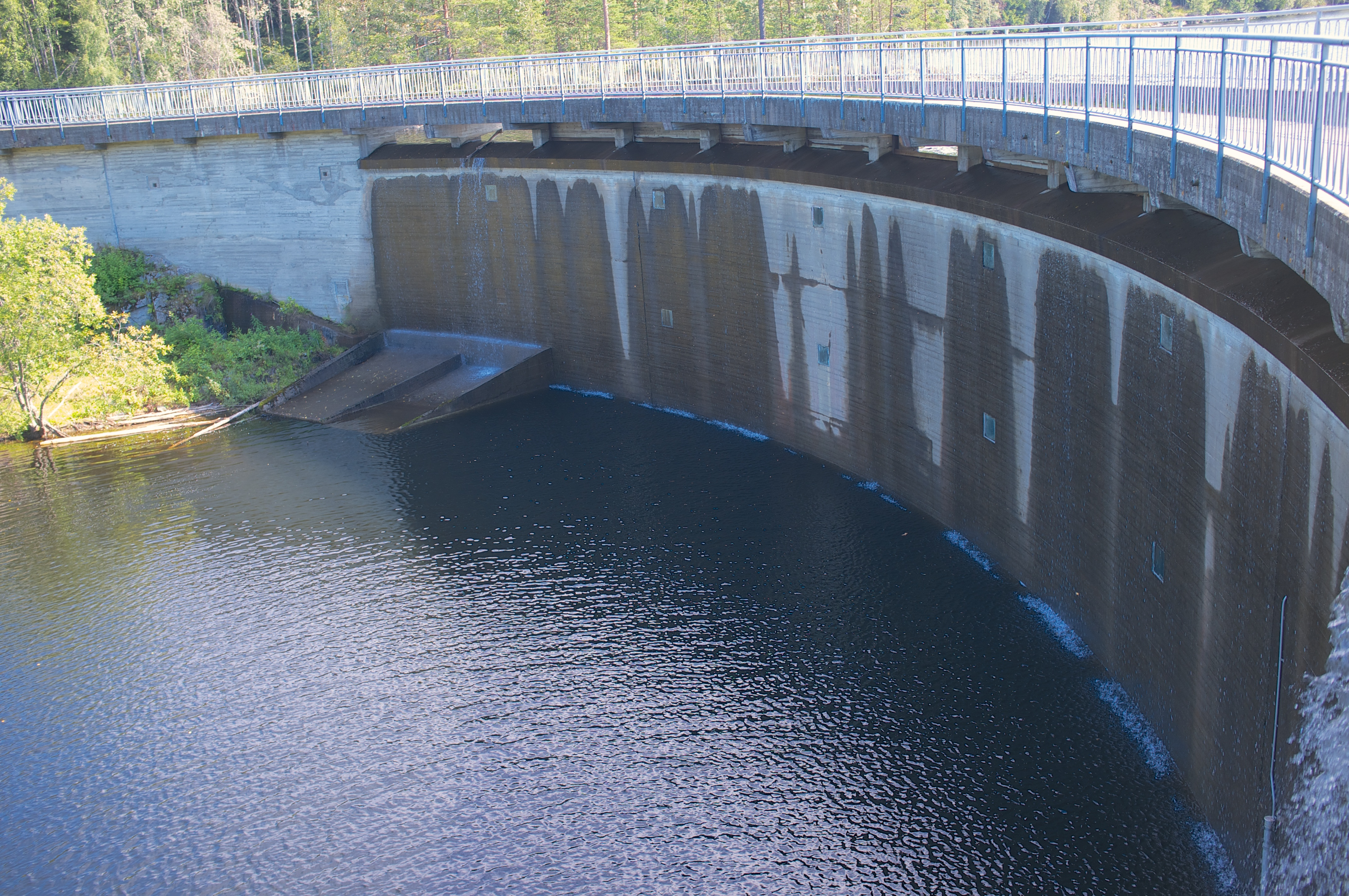 Fra Nord-Elvåga, på grensen mellom Oslo og Lørenskog.